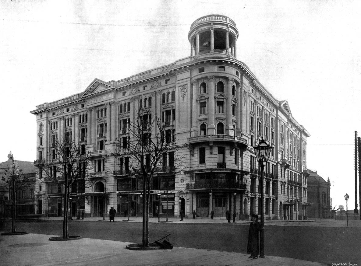 Готель "Брістоль" у Варшаві. Архітектор Владислав Марконі.